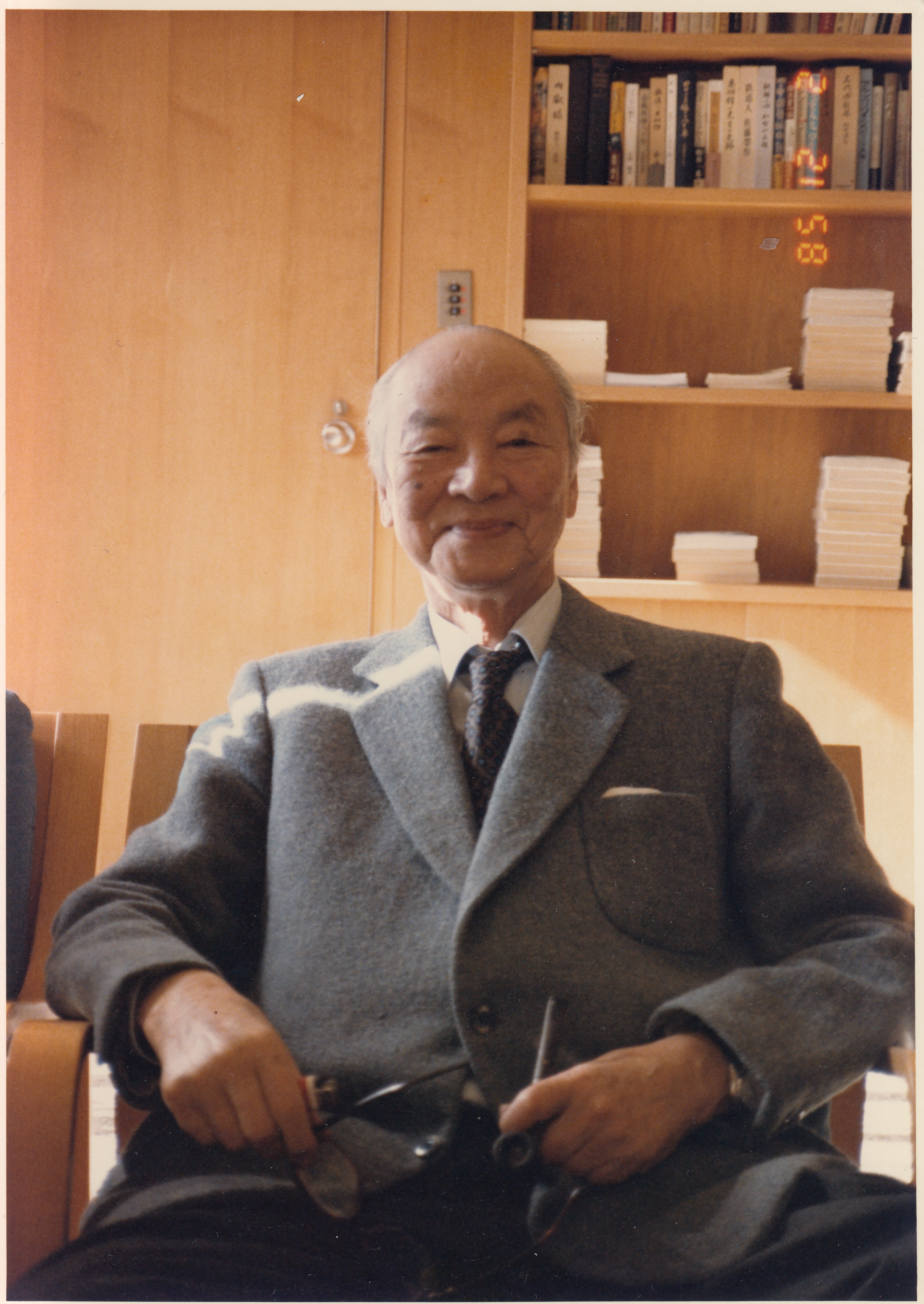 Shigeharu MATSUMOTO